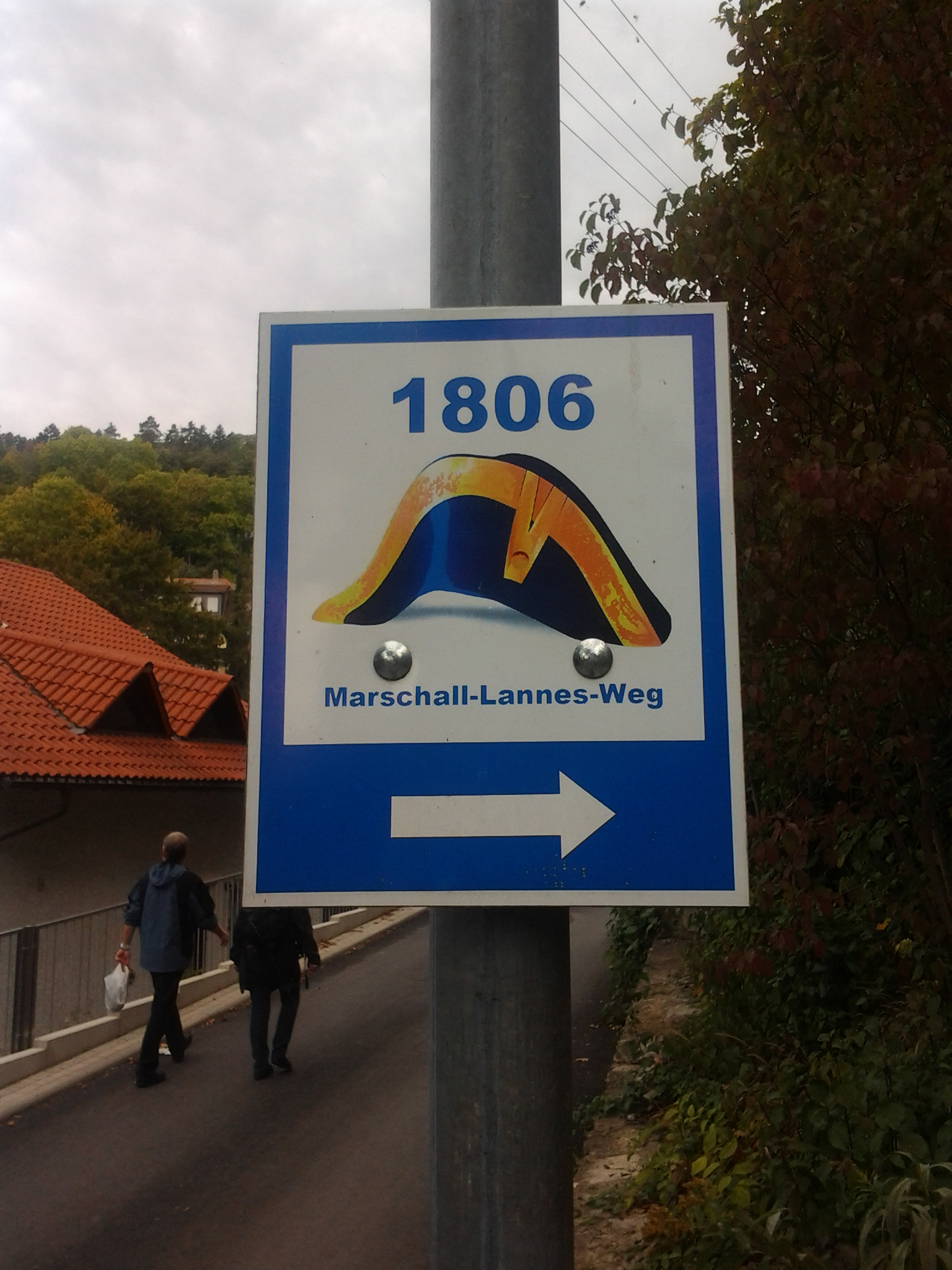 Wegweiser, Benennung eines Wanderweges in Cospeda bei Jena nach Marschall Lannes, der in der Schlacht bei Jena-Auerstaedt 1806 ein französisches Korps befehligte